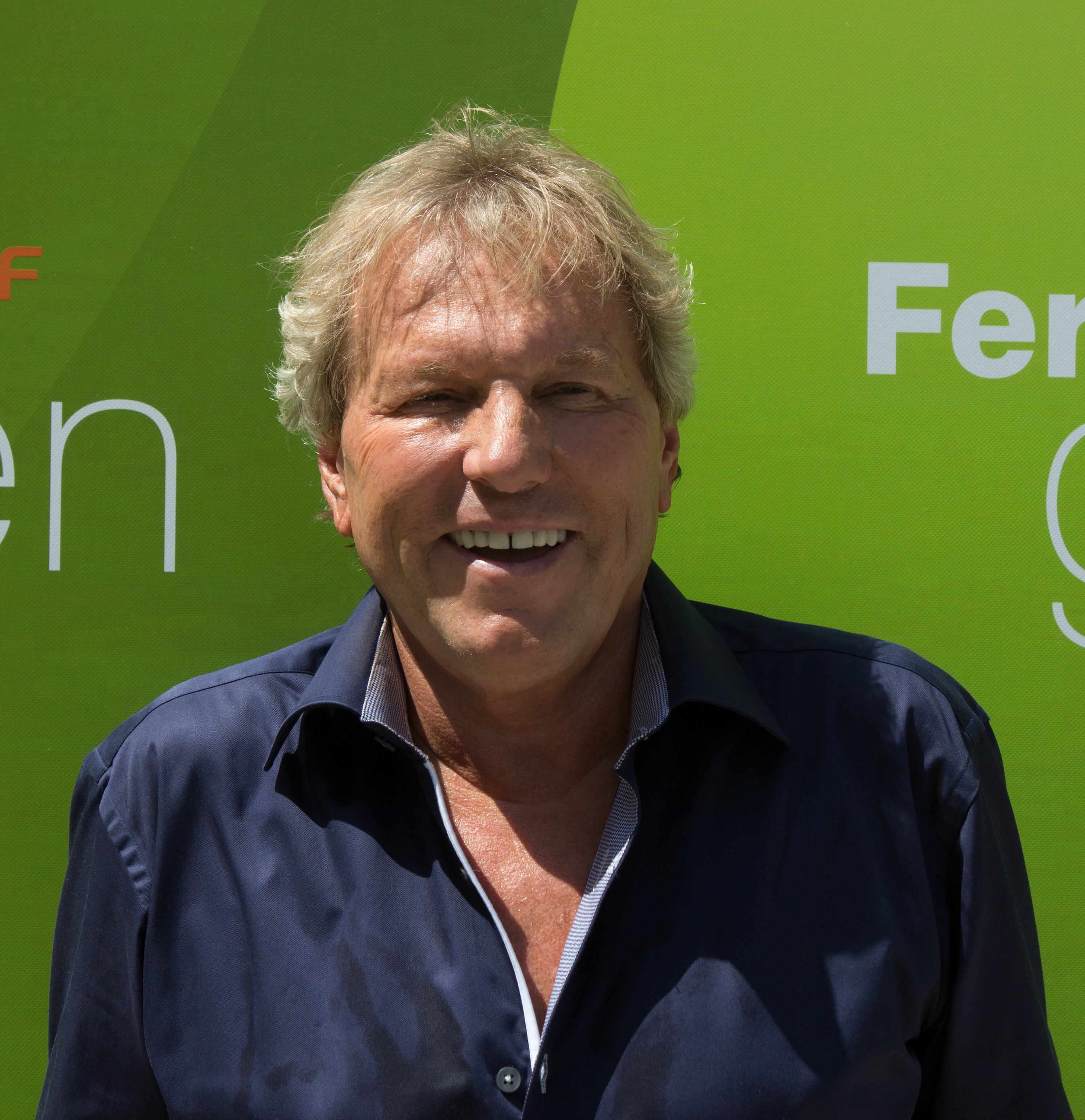 Bernhard Brink als Gast beim ZDF-Fernsehgarten am 27. Mai 2018 in Mainz.